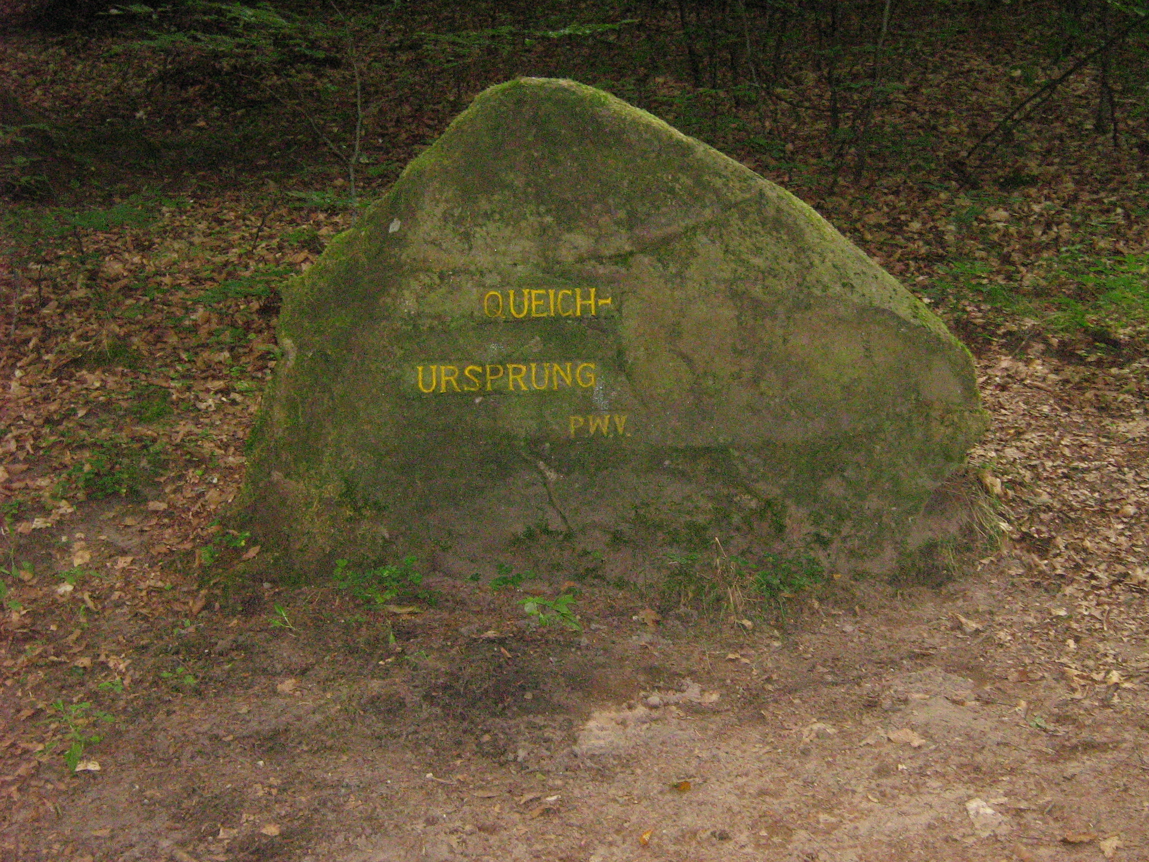 Ritterstein 214, Quelle der Queich südlich Hauenstein